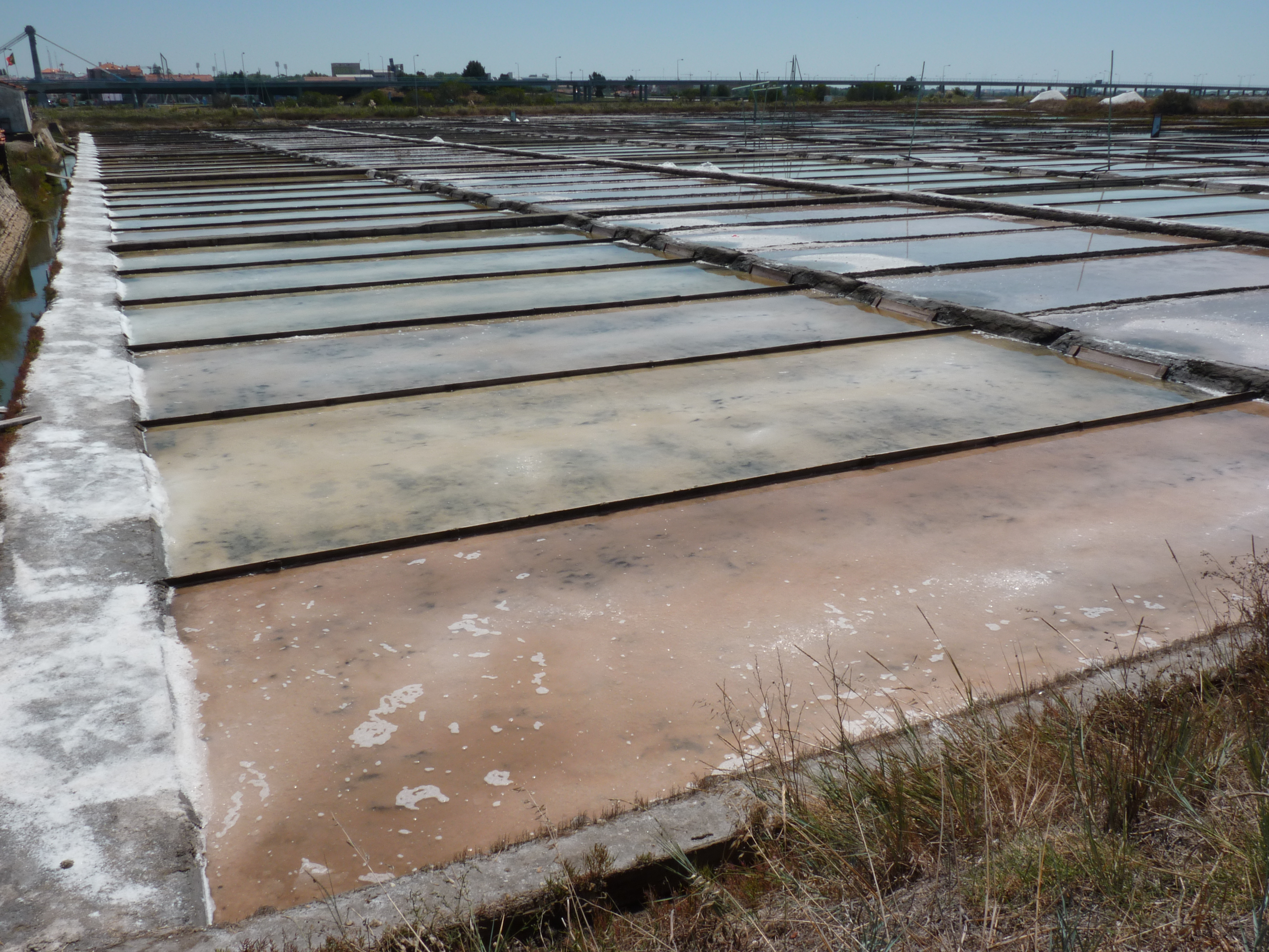 Sal em Aveiro